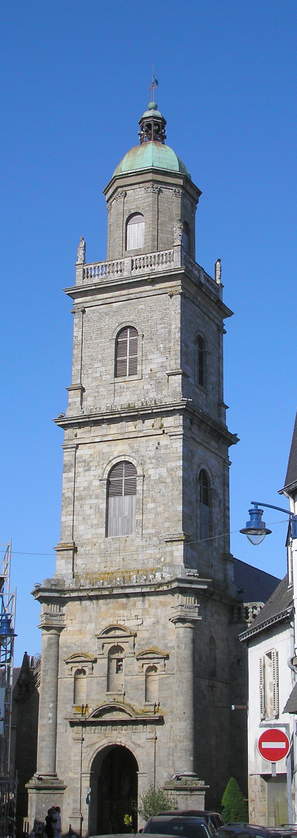 Auray (Bretagne, France). Clocher de l'église Saint-Gildas.